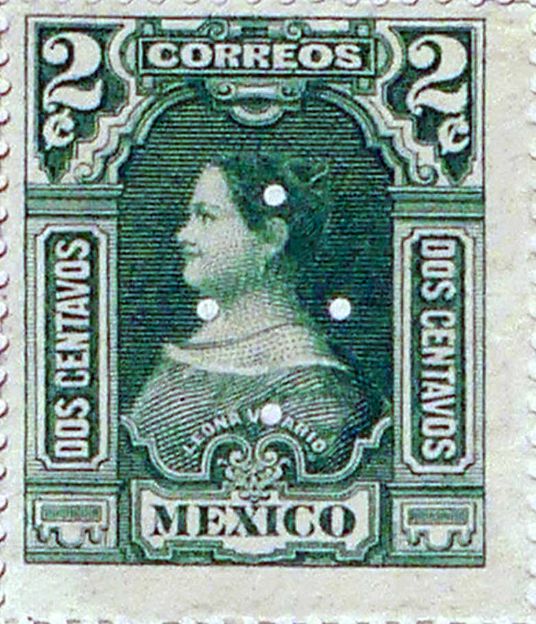 Timbre Postal de 1910, Correos de México, con imagen de Leona Vicario. Dos centavos.